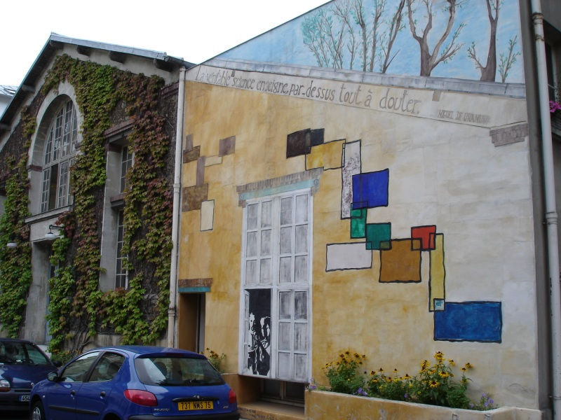 Vue prise dans l'ESPCI